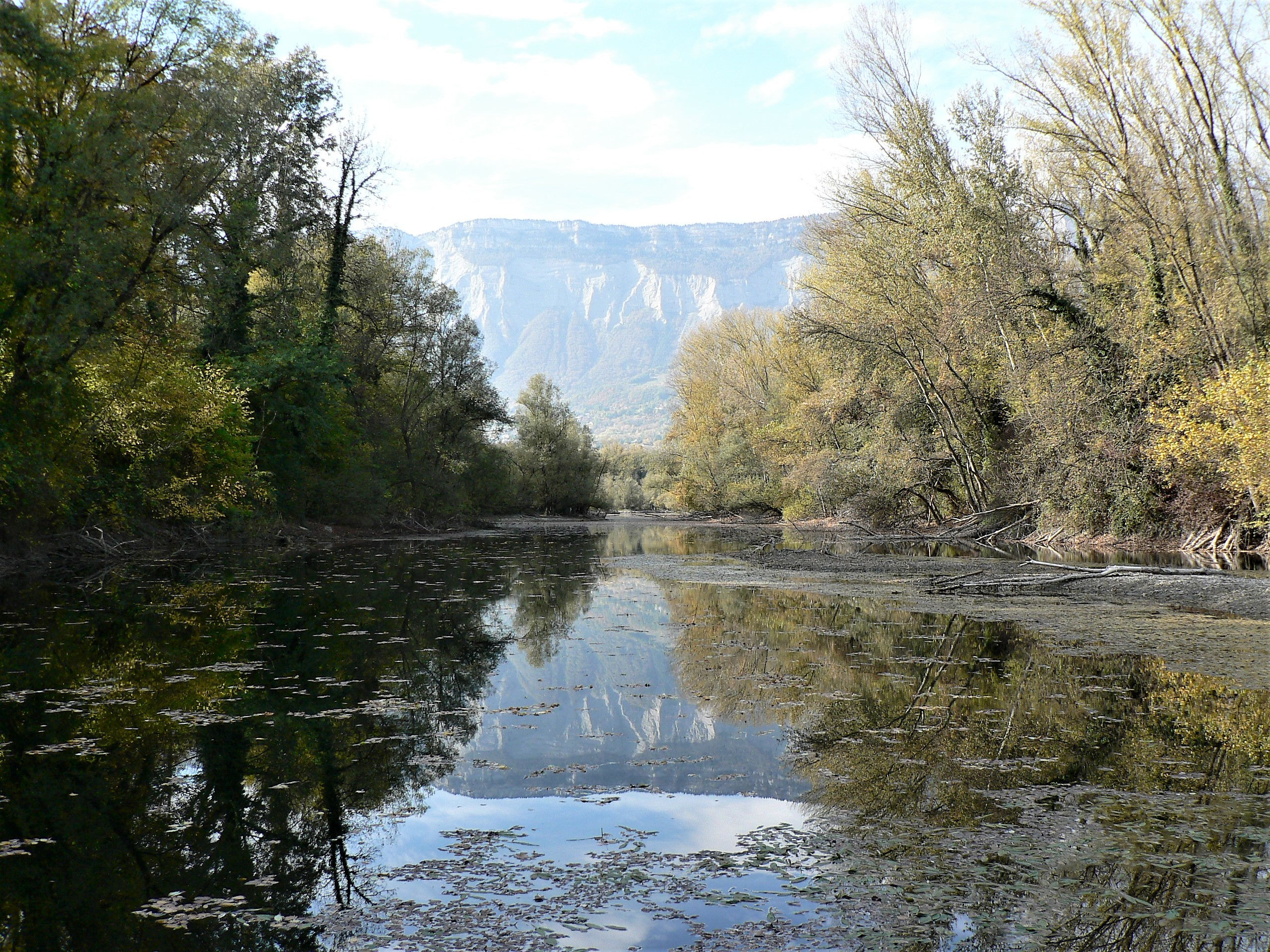 ENS Bois de La Bâtie, sur les cummunes de Saint-Ismier et du Versoud, Isère, AuRA, France.